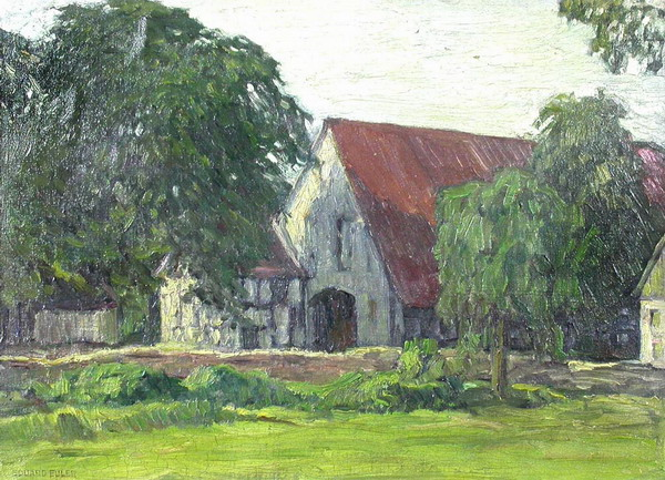 Eduard Euler(*1867 +1931) "BAUMUMSTANDENES GEHÖFT AM NIEDERRHEIN" Oel/Leinwand (aufgezogen). 33 x 44,5 cm. Rahmen. Signiert unten links Eduard Euler.